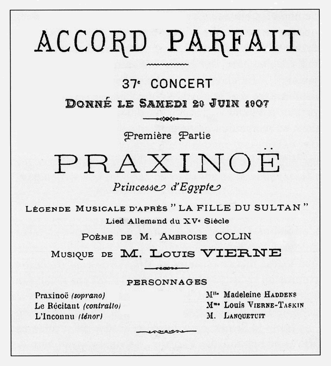 Louis Vierne - Praxinoe op.22, affiche de la création en concert à Rouen, 1907